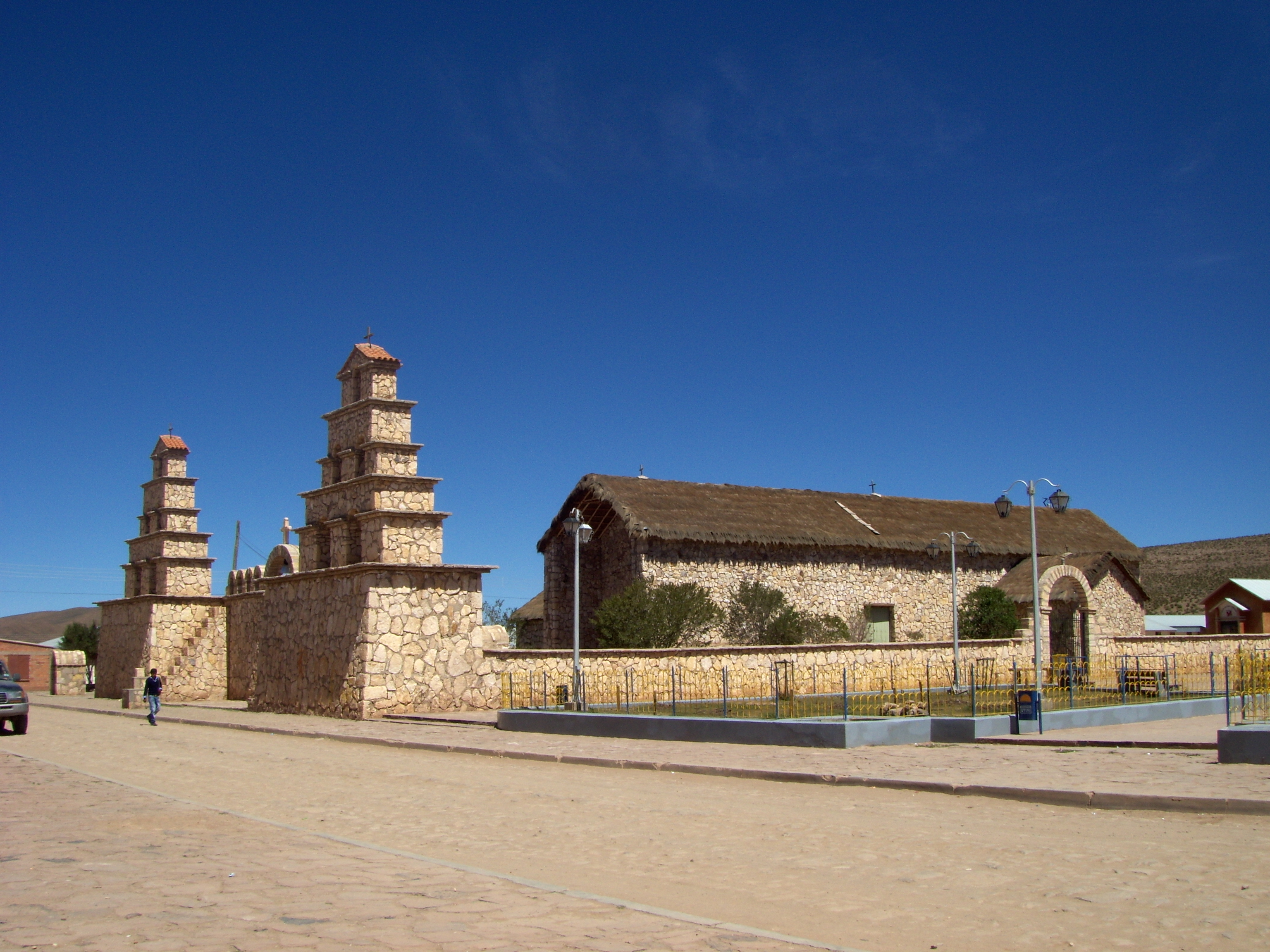 Iglesia de San Cristobal, Municipio de Colcha K, Provincia Nor Lipes, Departamento de Potosi, Bolivia. Iglesia de la época colonial reconstrida en el nuevo local de San Cristobal, para dar espacio a la explotación minera a cielo abierto.